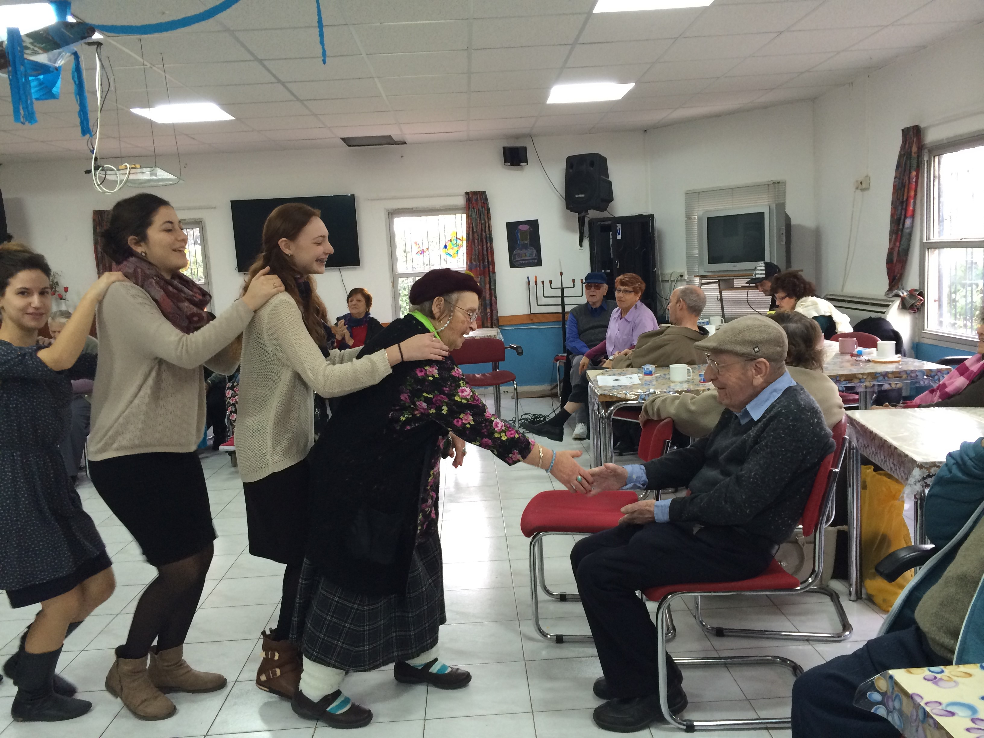 התנדבות של בנות שירות עם קשישים בקהילה